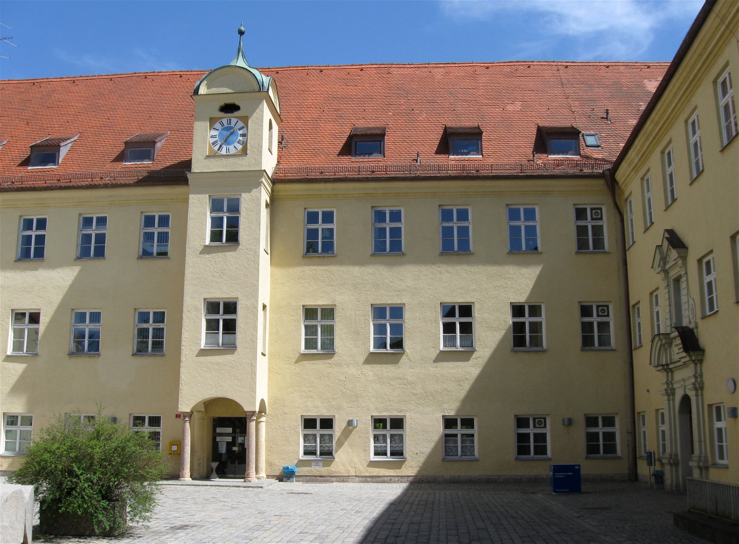 Alte Akademie 1 (Weihenstephan); ehem. Benediktinerkloster Weihenstephan, ehem. Konventbau, dreigeschossiger Westflügel der früheren Vierflügelanlage mit Rest des gotischen Kreuzganges, barockem Hoferker und Stuckdecken, sowie ehem. Abtswohnung und Gästetrakt mit barockem Festsaal, um 1700.